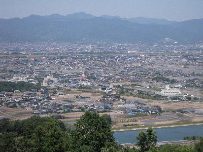 Template:旧久谷村の風景(2009/6/12撮影)北東方向を望む